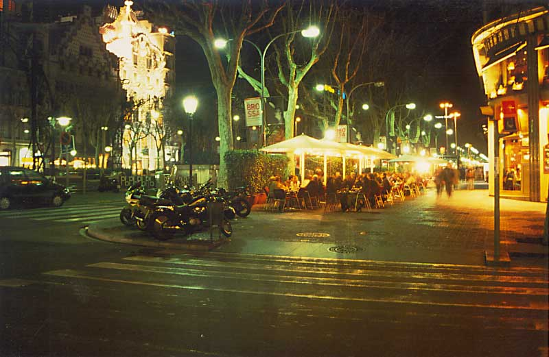 Nachtaufnahme